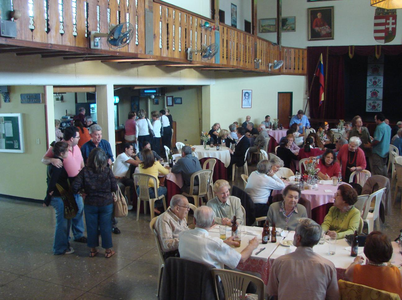 Hungarian Cultural House in caracas, Venezuela